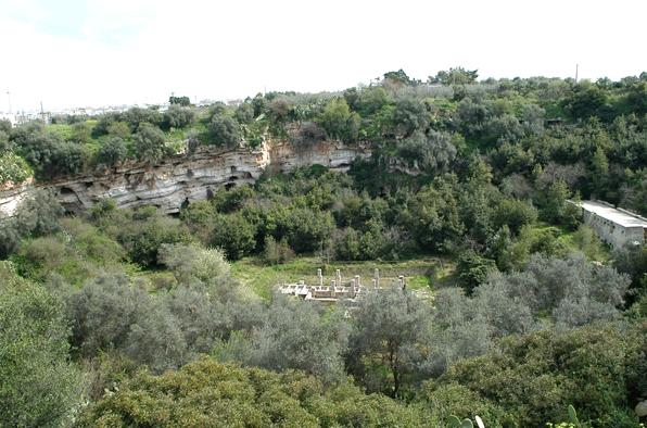 Insediamenti rupestri presso la dolina carsica conosciuta come Pulo in territorio di Molfetta. Licensing Immagine tratta dal sito Molfetta.live. Autorizzazione all'uso concessa, previa citazione della fonte. OTRS #2007061810004126